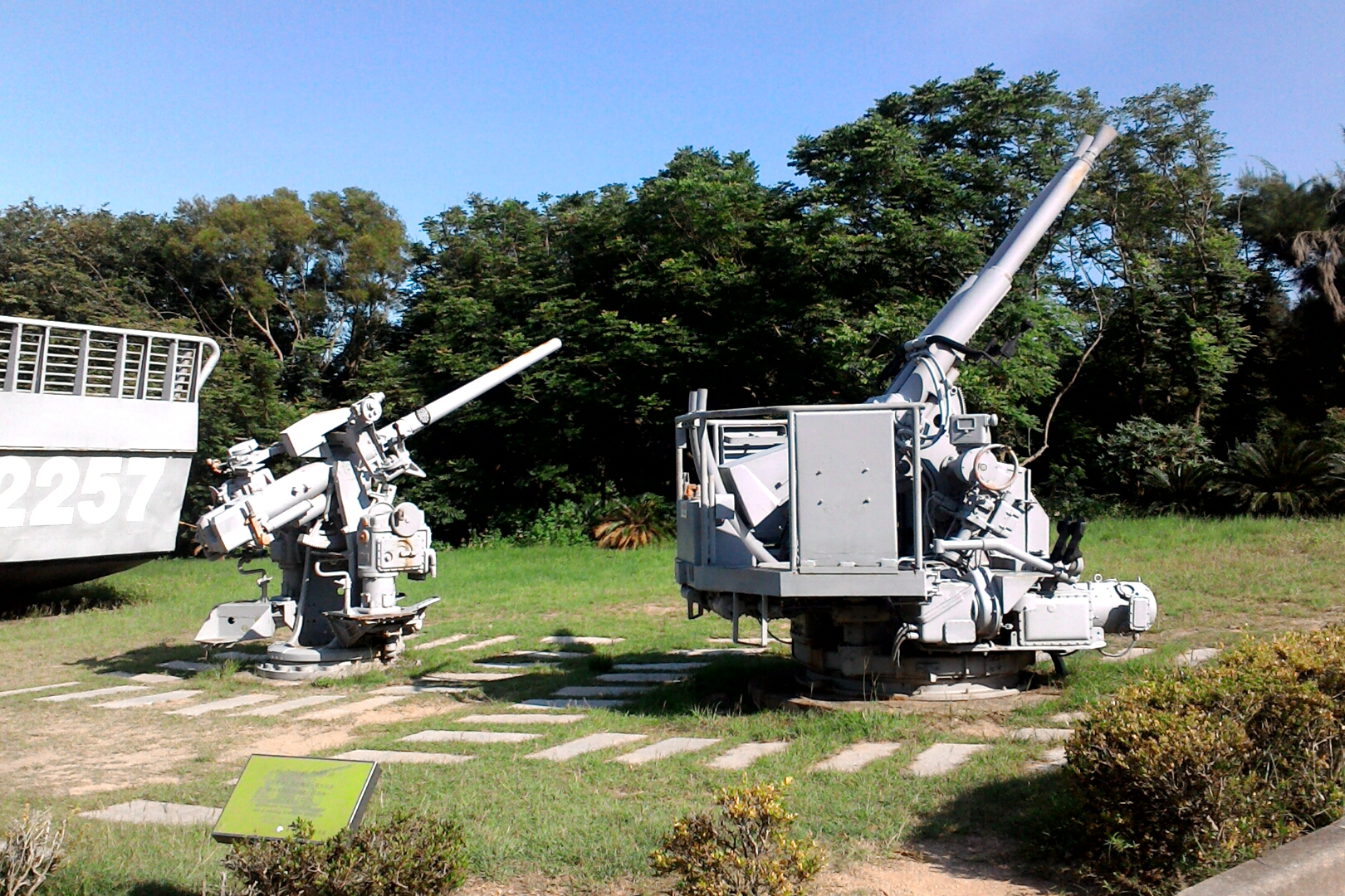 40公厘雙管砲與3吋50倍單管砲,福建省金門縣金城鎮古城里